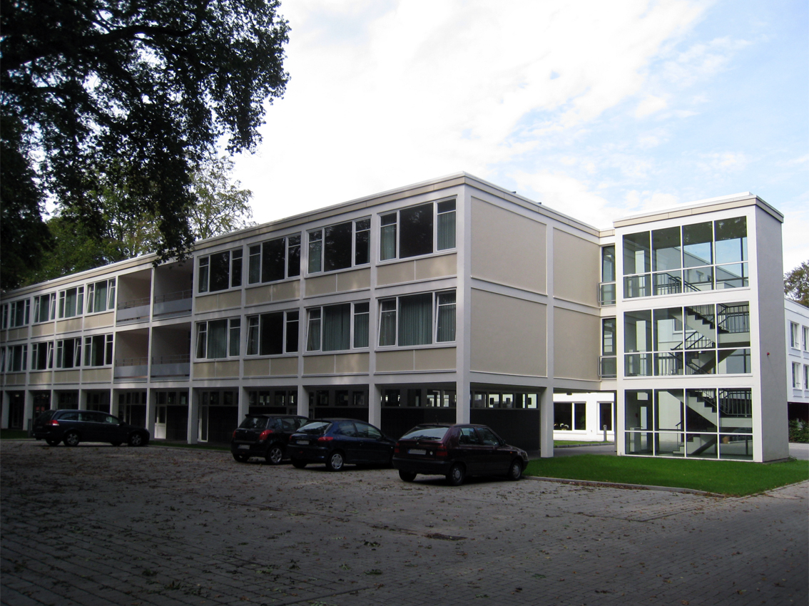 Wohnanlage des Amerikanischen Generalkonsulats in Bremen, Marcusallee 2, 4 / Horner Heerstraße.Die Gesamtanlage ist ein geschütztes Kulturdenkmal in der Freien Hansestadt Bremen, mit der Nr. 1878 beim Landesamt für Denkmalpflege registriert.